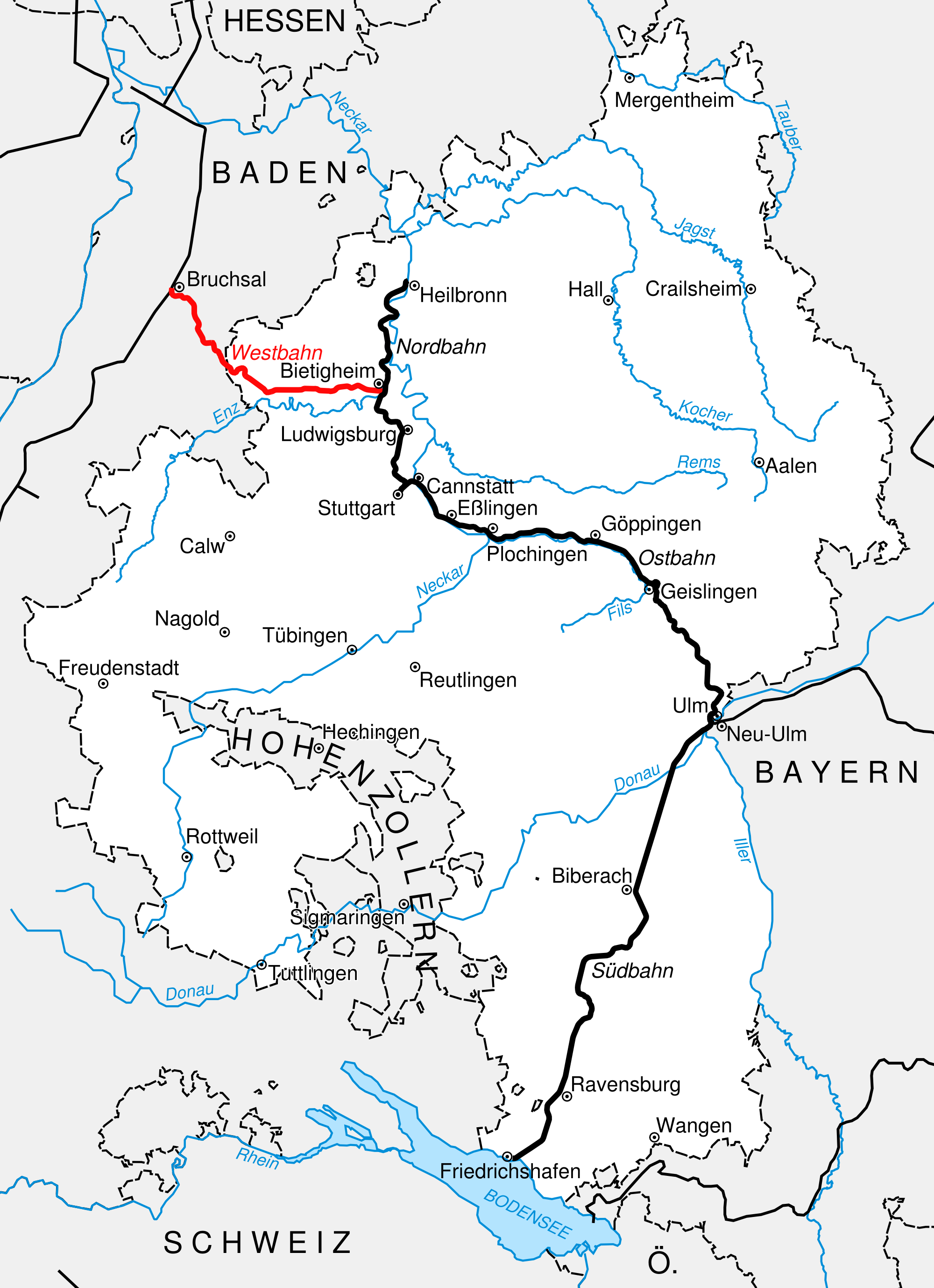 Karte des württembergischen Eisenbahnstreckennetzes, Stand 1854. Rot markiert: Westbahn (Bietigheim–Bruchsal).